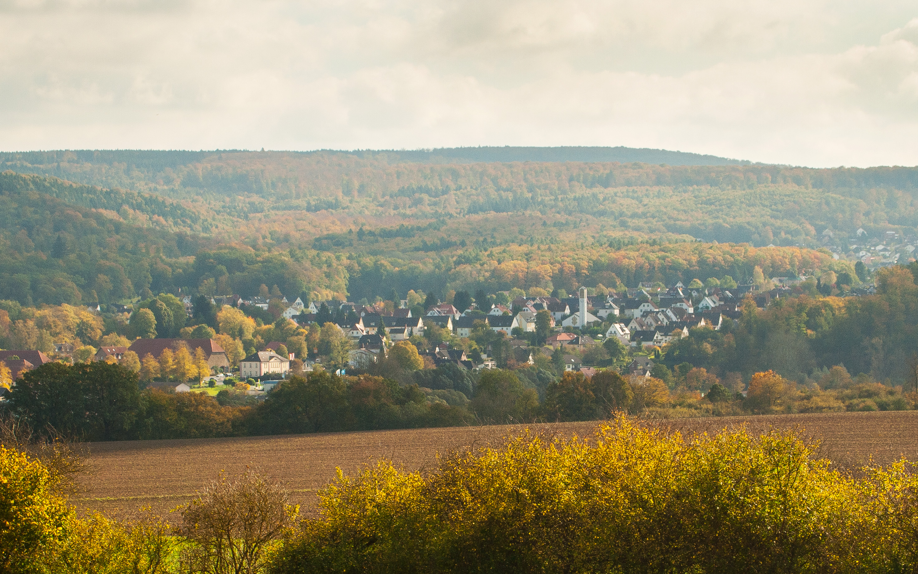 Der Ortsteil Schieder von Schieder-Schwalenberg, im Kreis Lippe, Nordrhein-Westfalen. Ansicht von Westen.